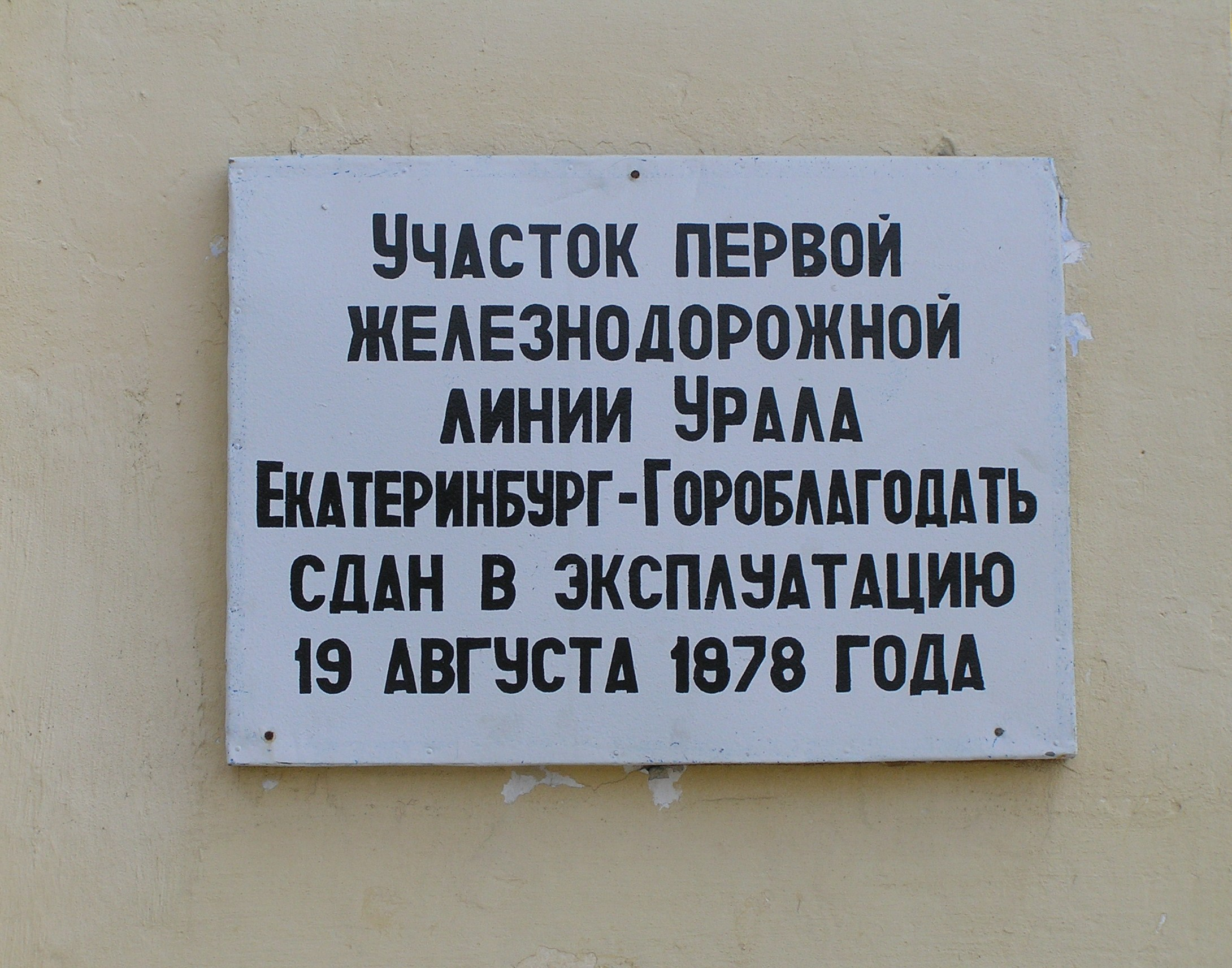 Мемориальная доска на здании вокзала ст. Гороблагодатская, Свердловская ж.д.